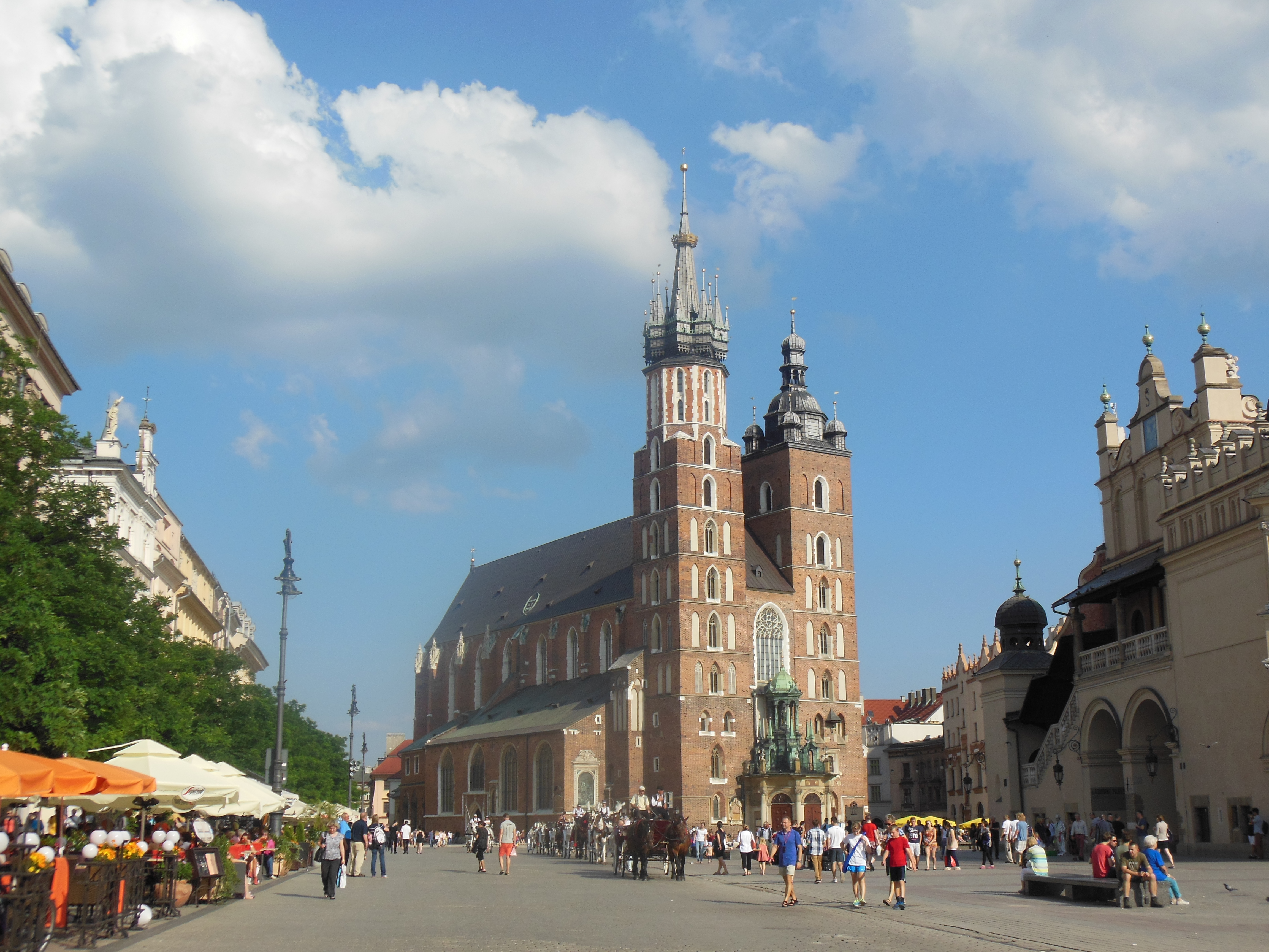 Kościół Mariacki w Krakowie na Rynku Głównym.